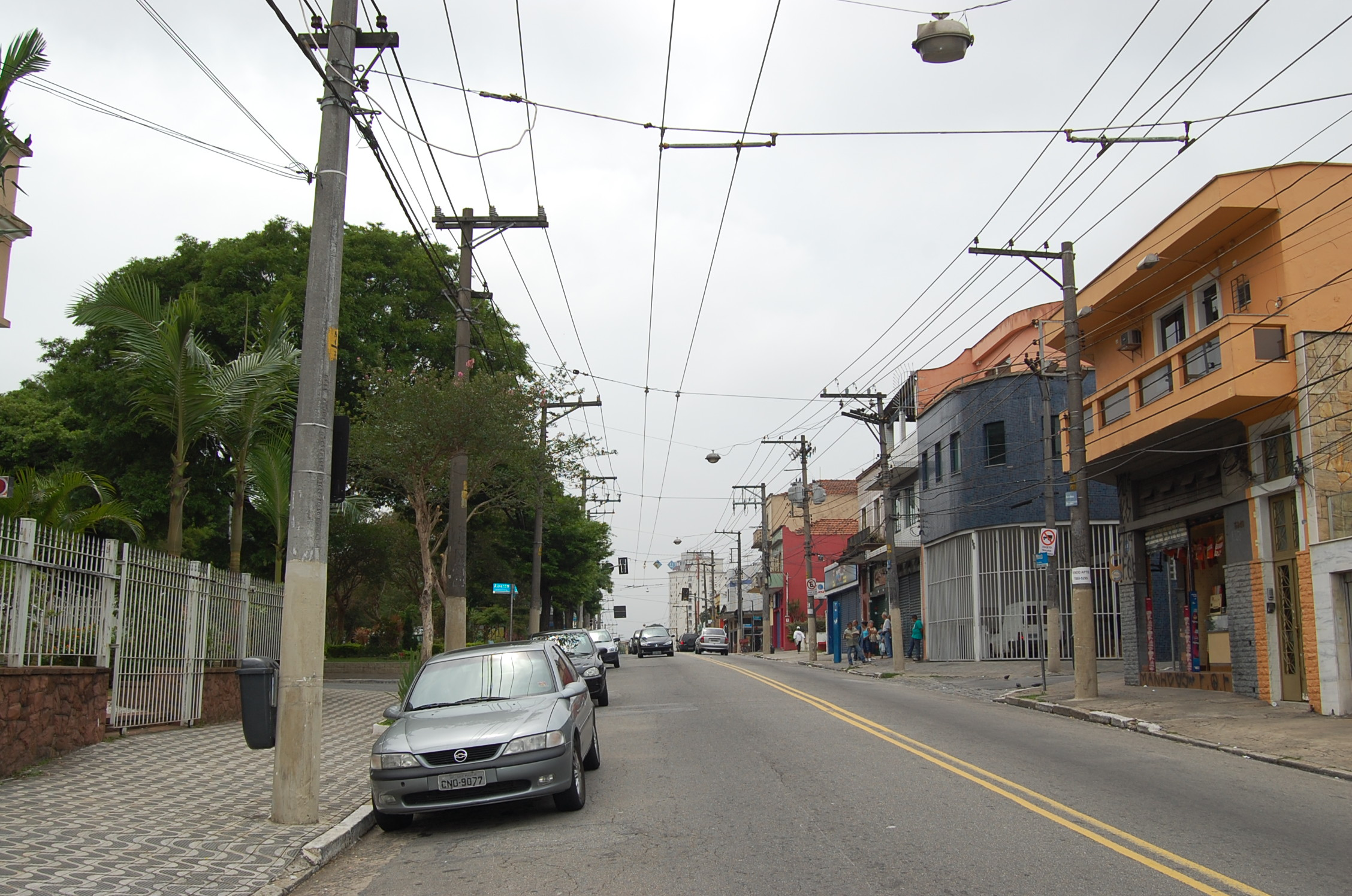 Rua da Mooca na altura da paróquia Nossa Senhora do Bom Conselho, Mooca, São Paulo